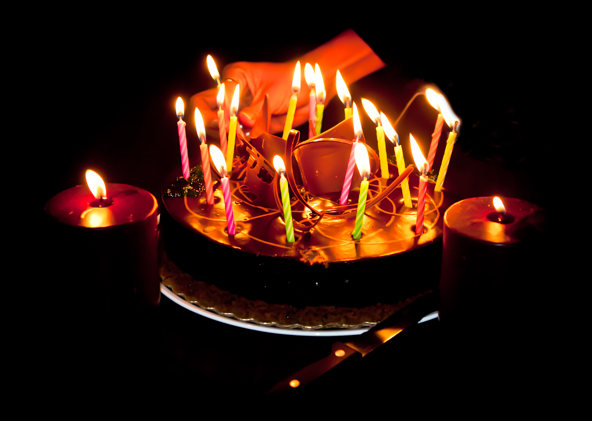 Birthday Cake